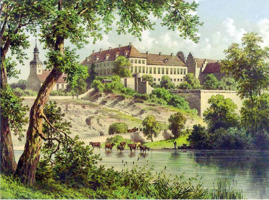 Schloss Walbeck, Mansfelder Gebirgskreis, Provinz Sachsen, Lithografie aus dem 19. Jahrhundert